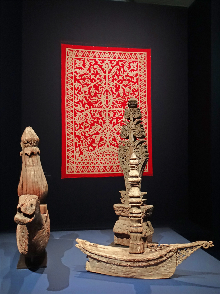 Au premier plan, marqueurs de tombe et au mur, tenture figurant l'Arbre de Vie Tenture (Tabil) / Cette tenture est suspendue au mur lors de fêtes importantes du peuple tausug Archipel de Sulu, île de Jolo, Population tausug Coton XIXè-XXè siècle Musée du quai Branly Marqueur de Tombe (Sunduk) Archipel de Sulu, îles de Tawi-Tawi Population sama dilaut Bois XIXè siècle Musée du quai Branly (ancienne collection du musée Barbier-Mueller, Genève) Objets présentés dans l'exposition : "Philippines, archipel des échanges" du mardi 9 avril au dimanche 14 juillet 2013 au Musée du quai Branly _______________ La scénographie de cette exposition est esthétiquement très réussie, son concepteur (dont je n'ai pas trouvé le nom sur le site web de l'exposition) n'a pas attiré l'attention sur son œuvre comme on le constate parfois, il s'est vraiment mis au service du propos de l'exposition et des objets. L'exposition est très lisible et lumineuse, les espaces sont bien articulés entre eux. J'espère pour le musée qu'elle attirera un vaste public car l'histoire de cet archipel comme ses traditions et ses formes d'expression artistique, sont très peu connus dans notre pays. L'exposition rassemble une sélection d’œuvres incontournables des arts des Philippines, sélectionnées dans les collections publiques philippines, américaines, européennes, ainsi que dans des collections privées. Extrait du site de l'exposition au musée du quai Branly